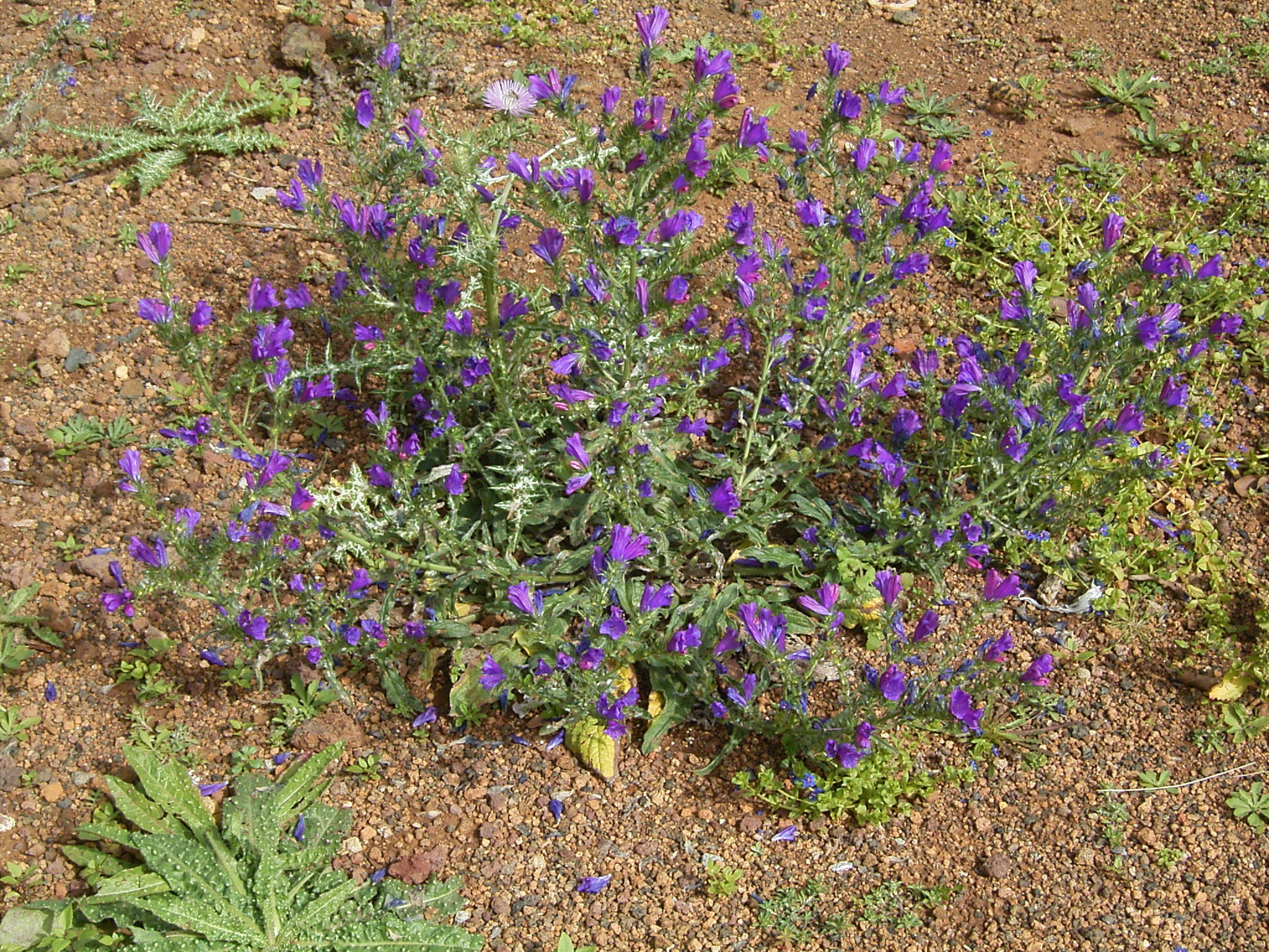 Echium plantagineum growing in Puntallana, La Palma, Canary Islands